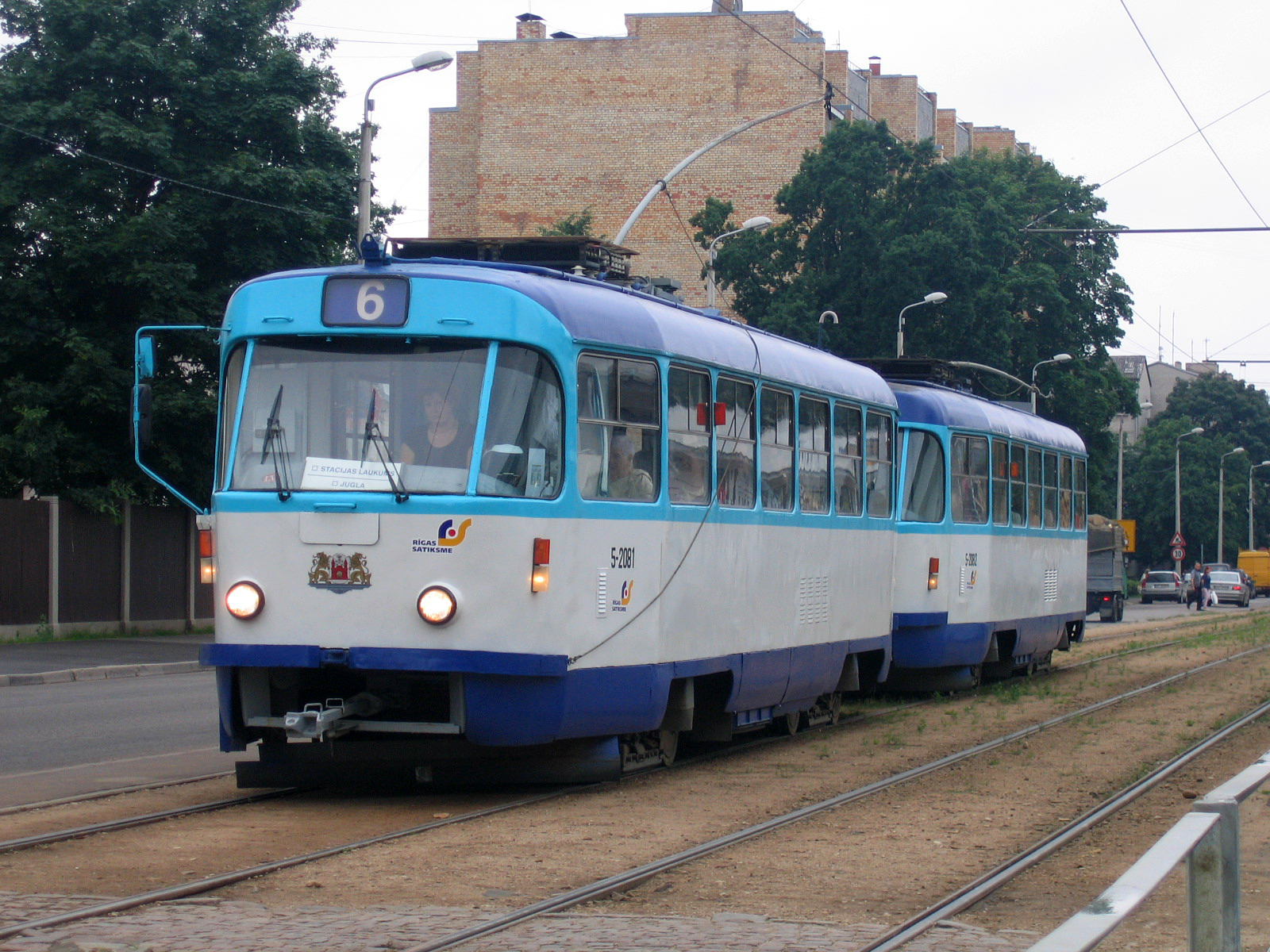 Trams in Riga, Latvia